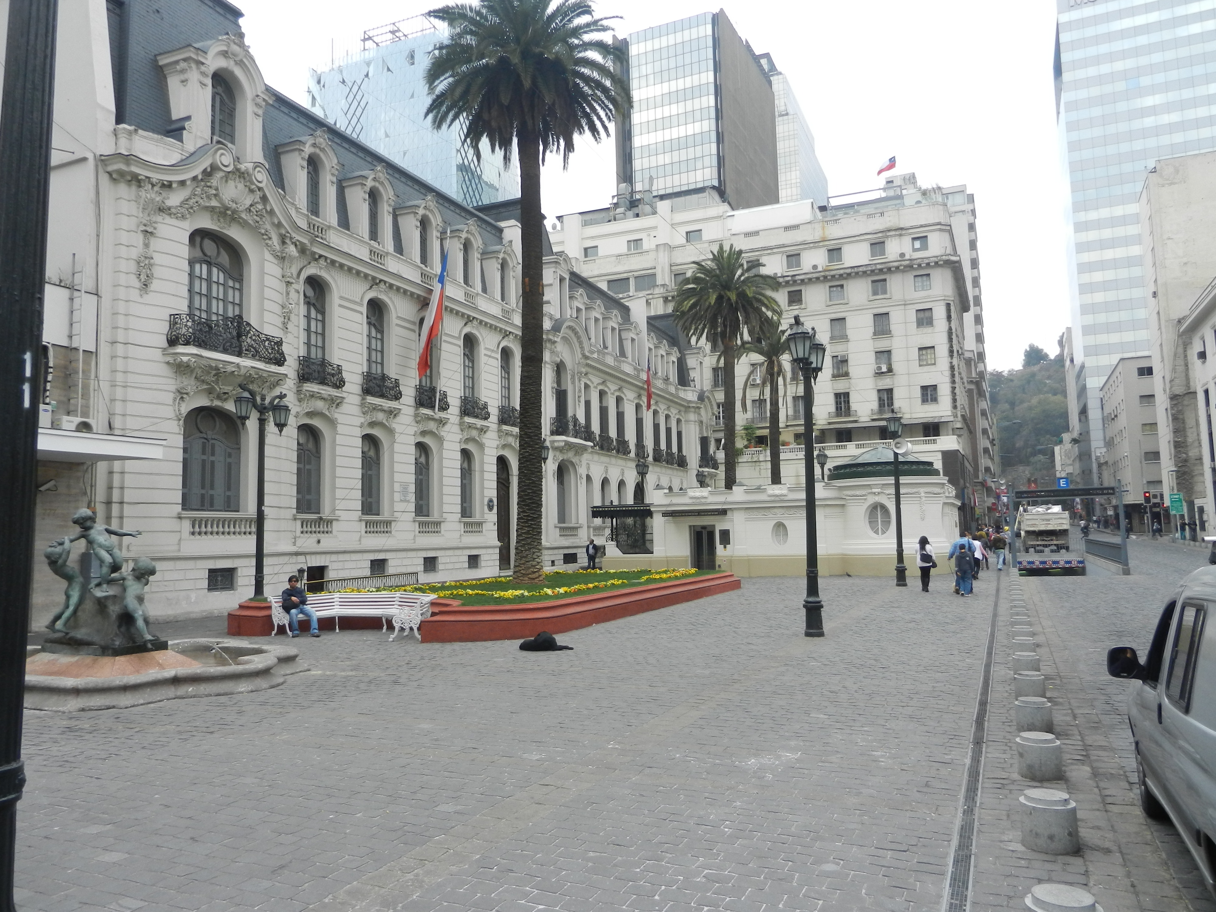 La plazoleta Patricio Mekis es una plaza ubicada en la calle Agustinas de Santiago de Chile, frente al Teatro Municipal que, junto con los inmuebles circundantes, fue declarada Monumento Nacional en 1973. Foto tomada de poniente a oriente (W to E): a la izquierda, la Fuente de los niños, obra del escultor argentino Arturo Dresco; más adelante, el Palacio Subercaseaux. This is a photo of a national monument in Chile: 815